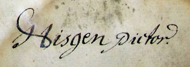 Unterschrift "Hisgen pictor" auf einer Rechnung des Kirchenmalers Daniel Hisgen, Lich, Hessen, Deutschland